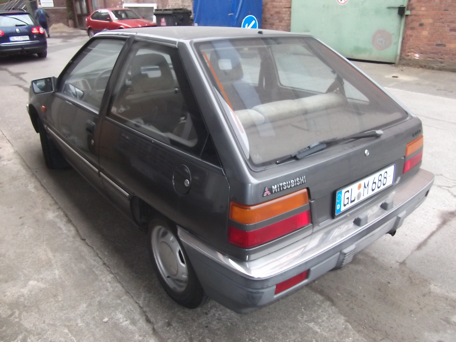 Eigenes Fahrzeug, Erstzulassung 5-1987